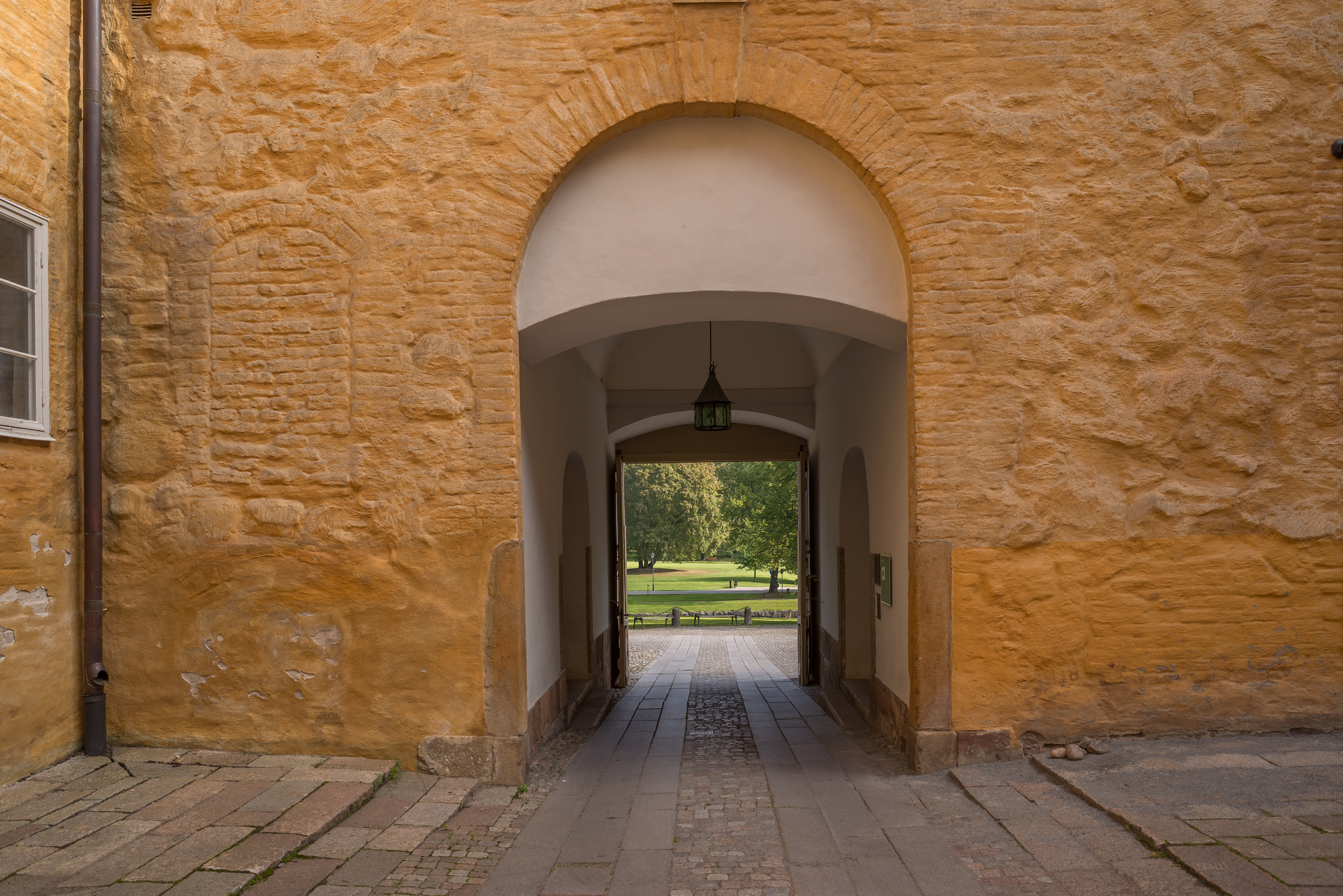 Västerås slott (Olympia 3)